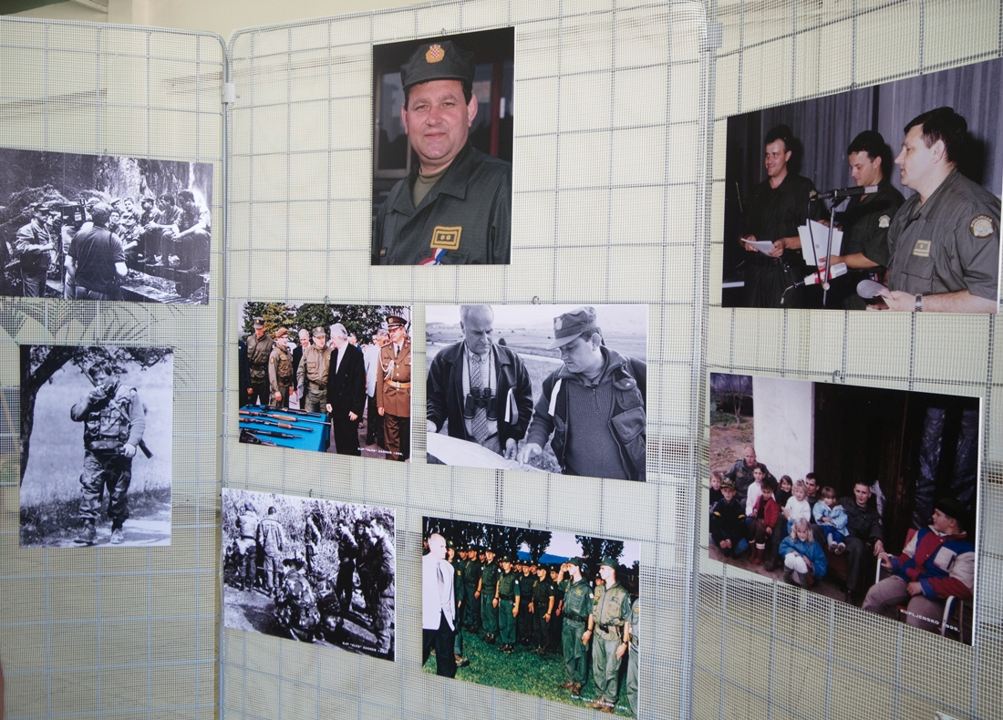 Izložba Fotografija „20 godina Alfi“; fotografije Mladena Markača u Policijskoj akademiji u Zagrebu